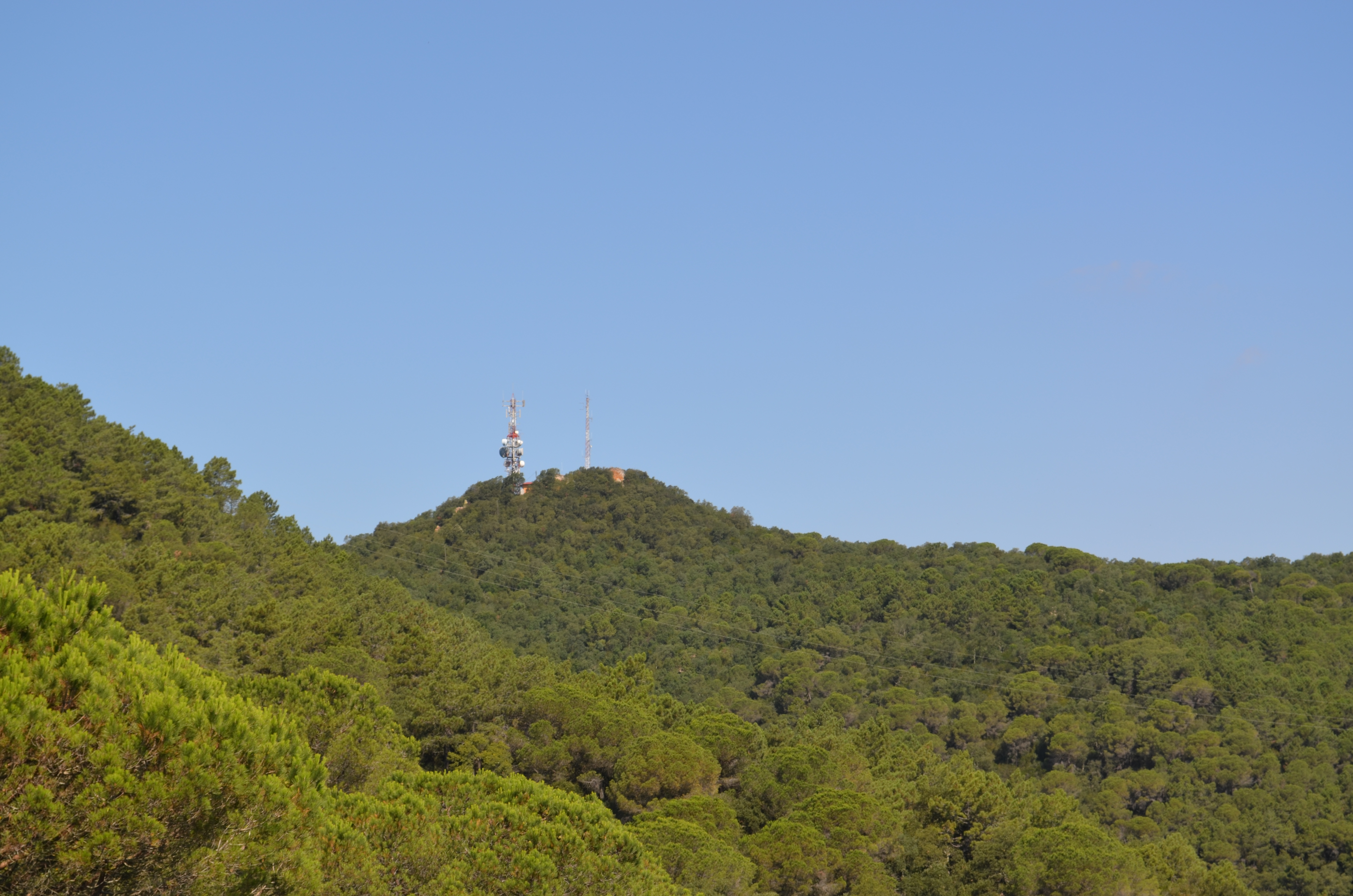 Montagut (Llagoste